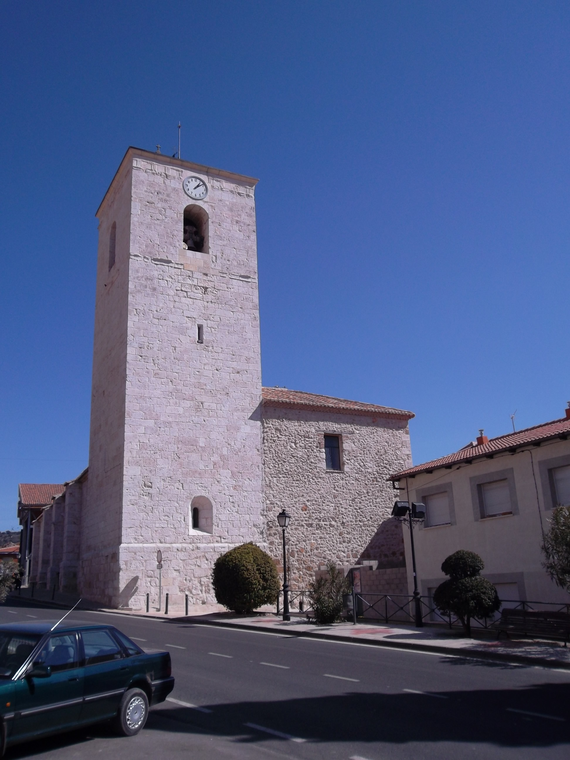 Chiloeches-Iglesia de Santa Eulalia de Mérida, de estilo renacentista construida en el siglo XVI. Torre y reloj.